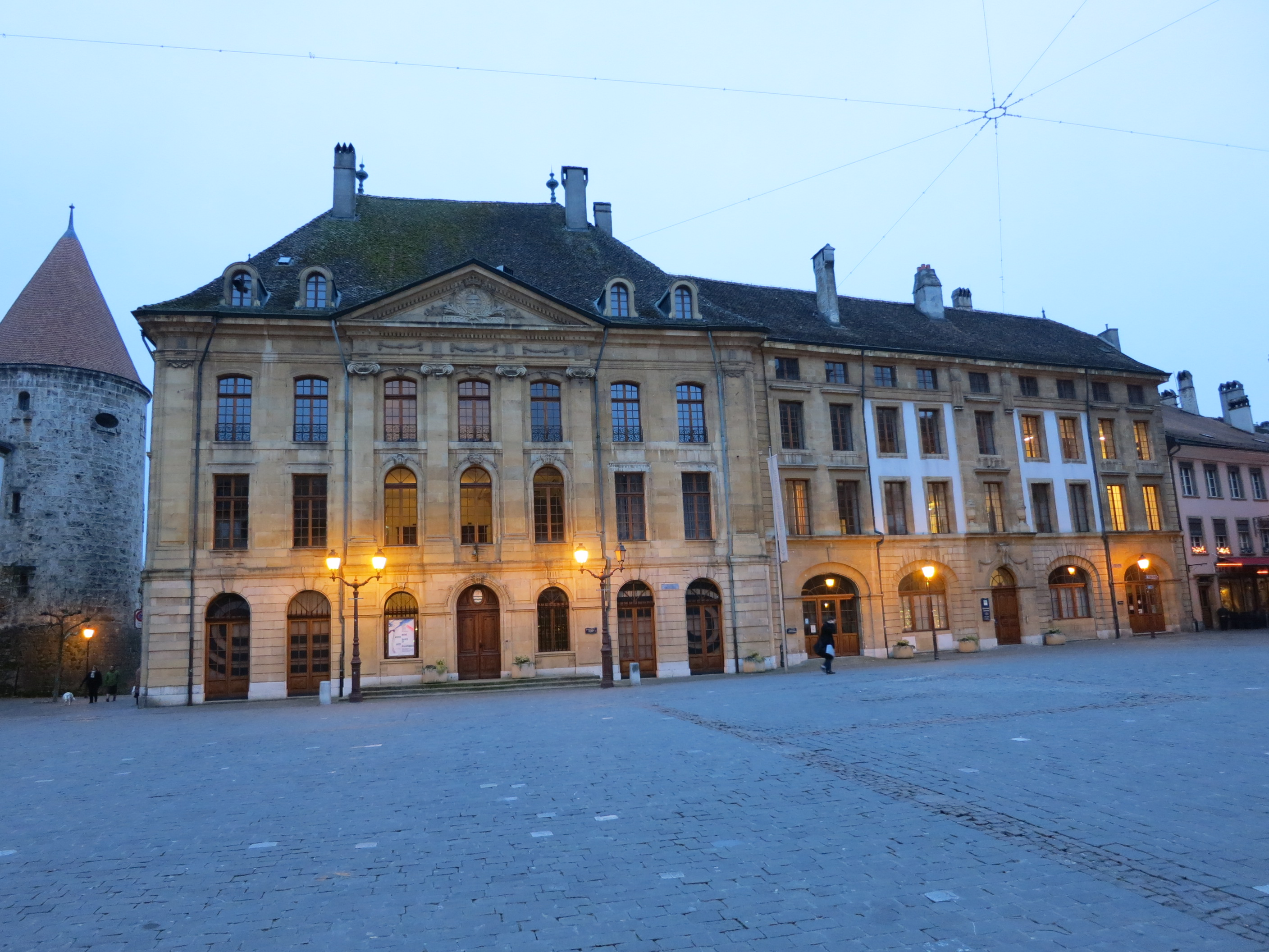 Rathaus, Yverdon-les-Bains, Schweiz